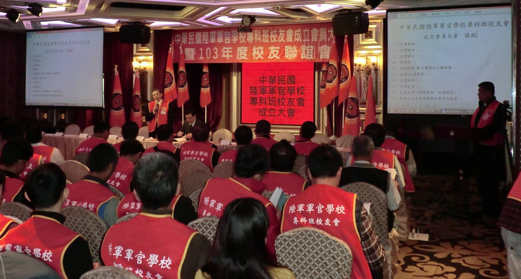 陸官專科班校友會成立會議進行